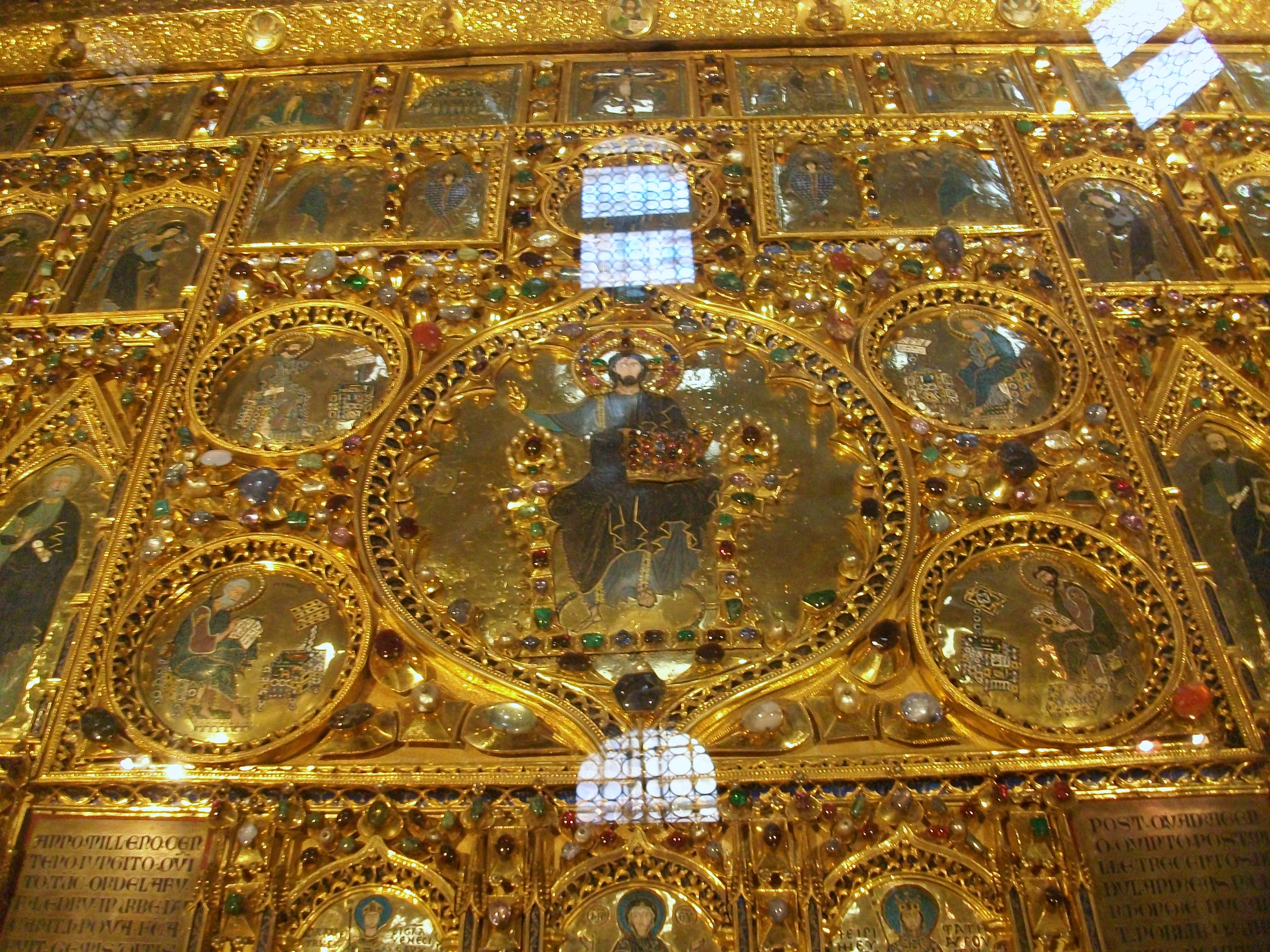 Detall de la Pala d'Oro, Basílica de sant Marc, Venècia.